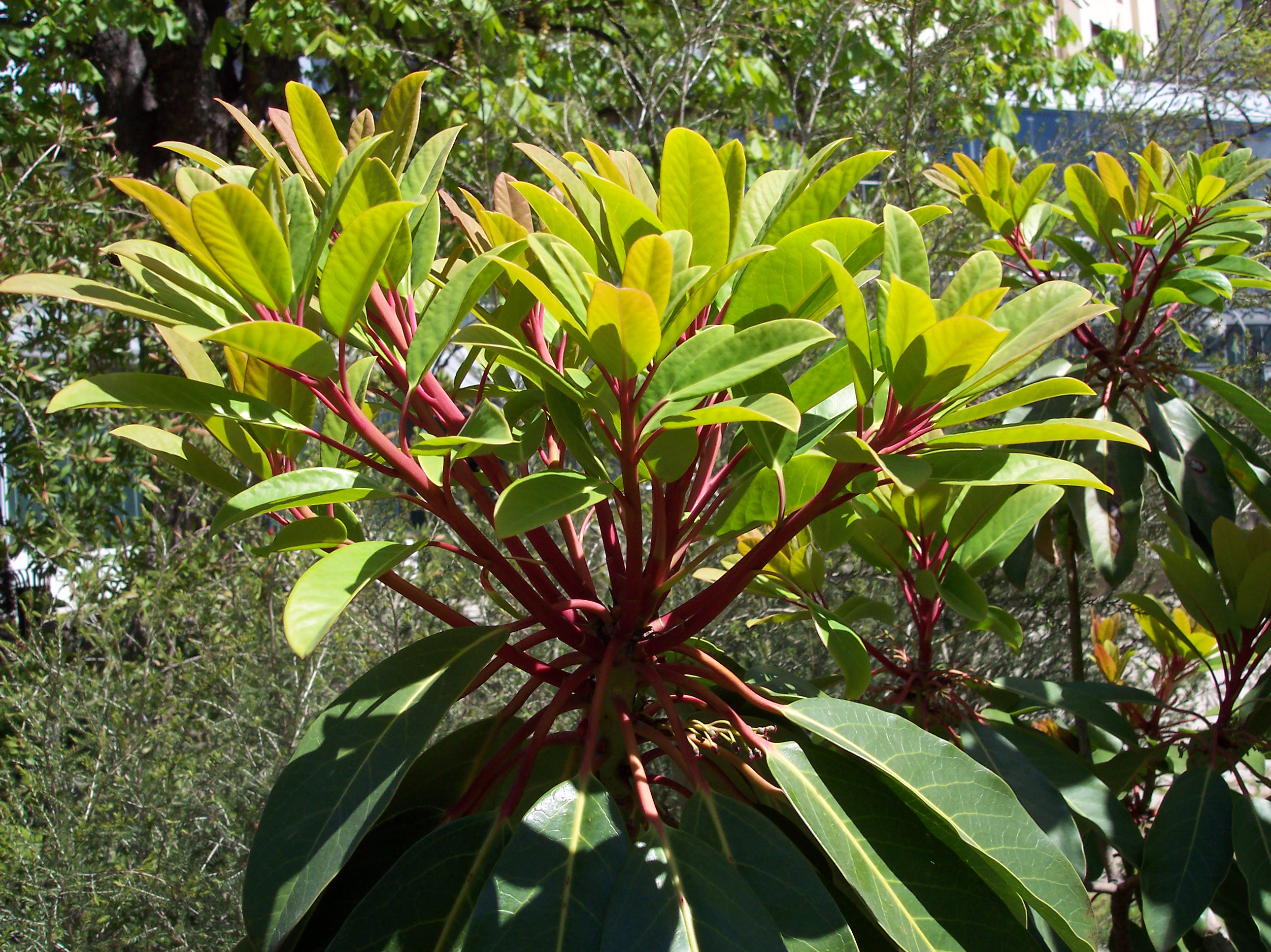 Daphniphyllum macropodum. Real Jardín Botánico, Madrid.